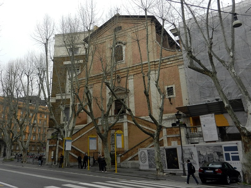 Roma - Chiesa di S. Maria della Concezione (Chiesa dei Cappuccini)